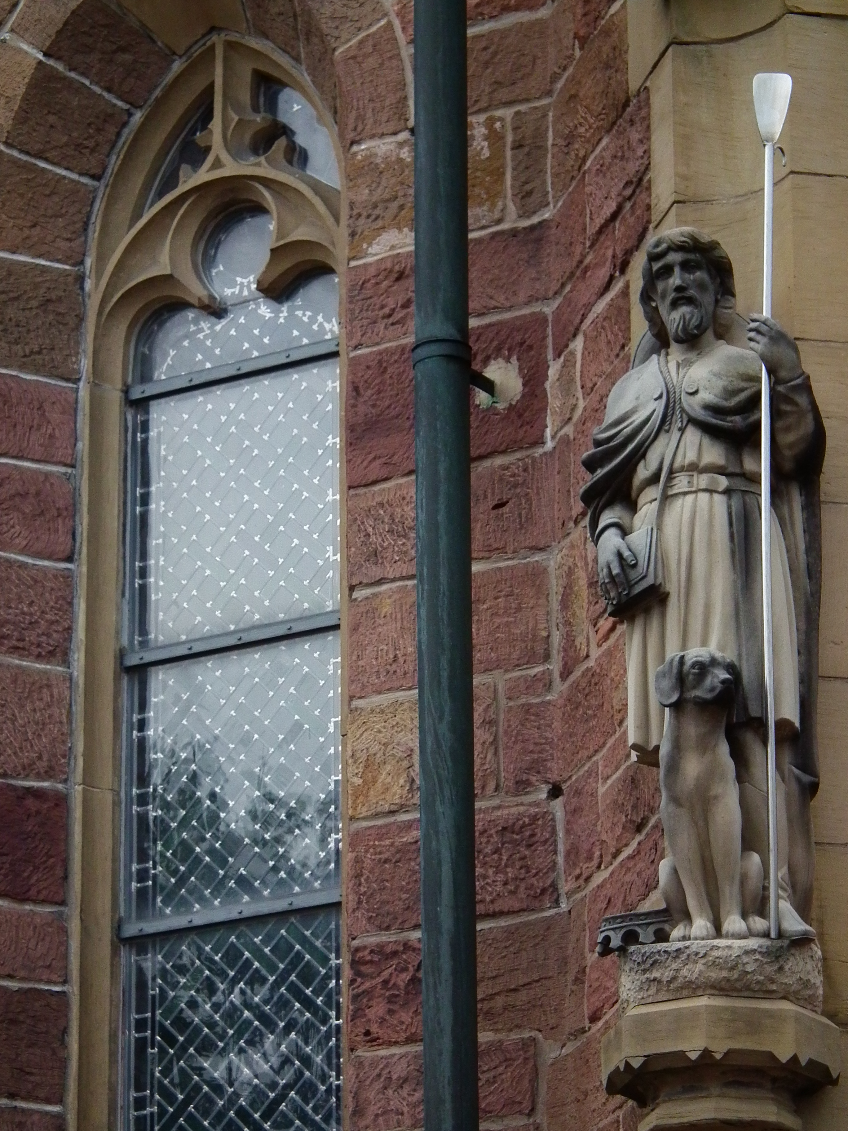 Darstellung des St. Wendelin an der katholischen Kirche St. Wendelin in Reilingen (Baden-Württemberg, Deutschland)